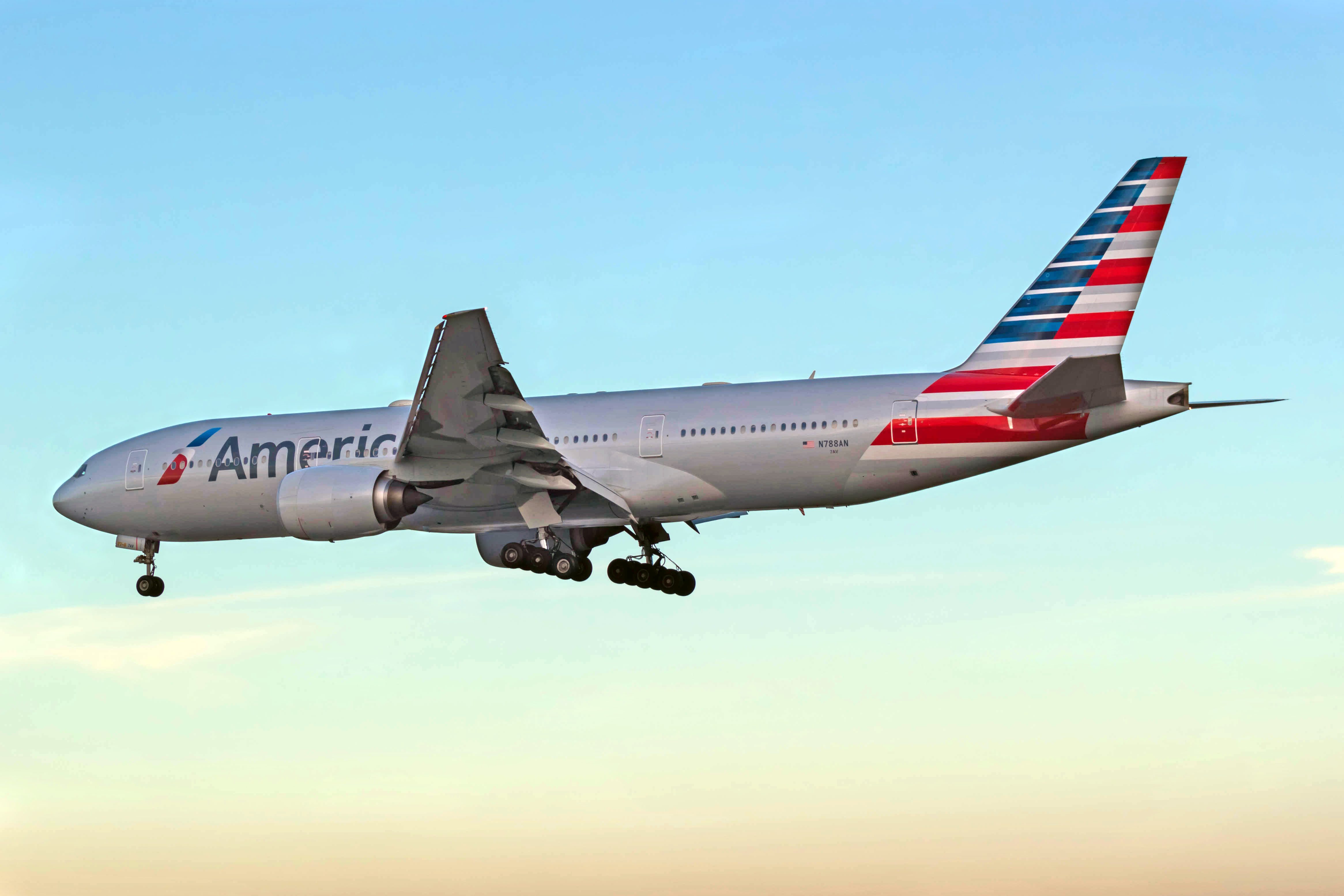 Boeing 777 de American Airlines aterrando no aeroporto de Barcelona.